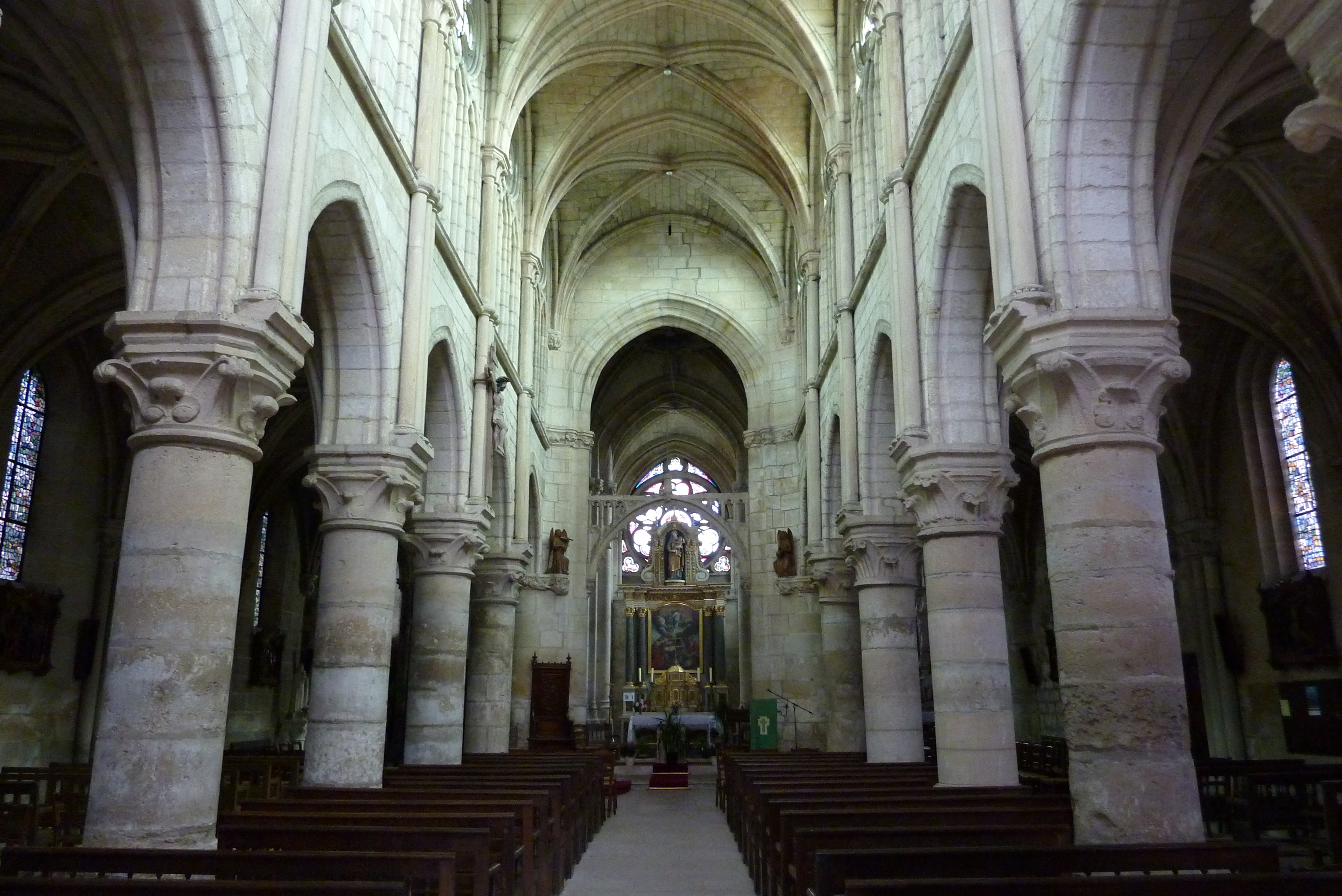 Katholische Kirche Notre-Dame-de-l’Assomption in Champagne-sur-Oise (Département Val-d’Oise) in der Region Île-de-France (Frankreich), Innenraum